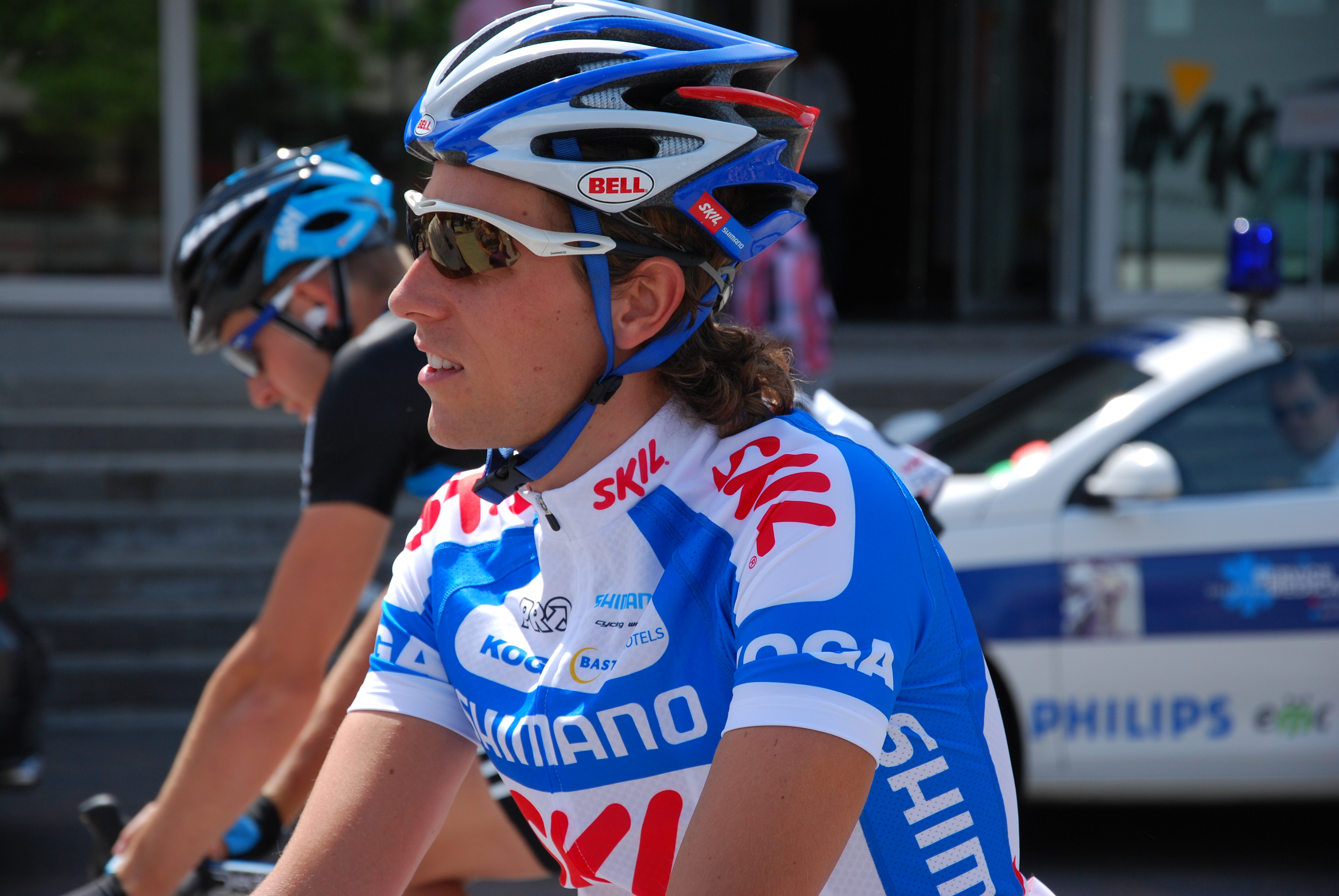 Koen de Kort (Gouda, 8 september 1982) is een Nederlands wielrenner, die opgroeide in het Brabantse Liempde.